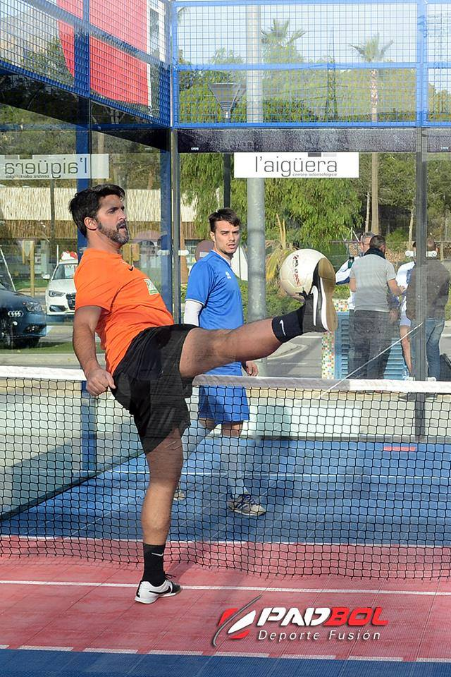 Volea